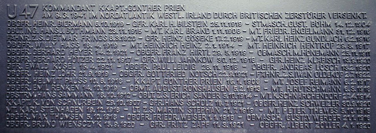 U-Boot-Ehrenmal Möltenort mit Eintragung U 47, Kommandant KKAPT. Günther Prien